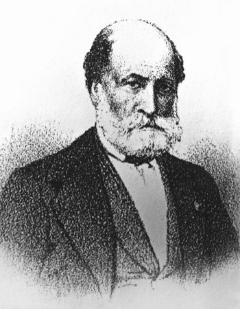 Griechischer Gelehrter, 19. Jahrhundert